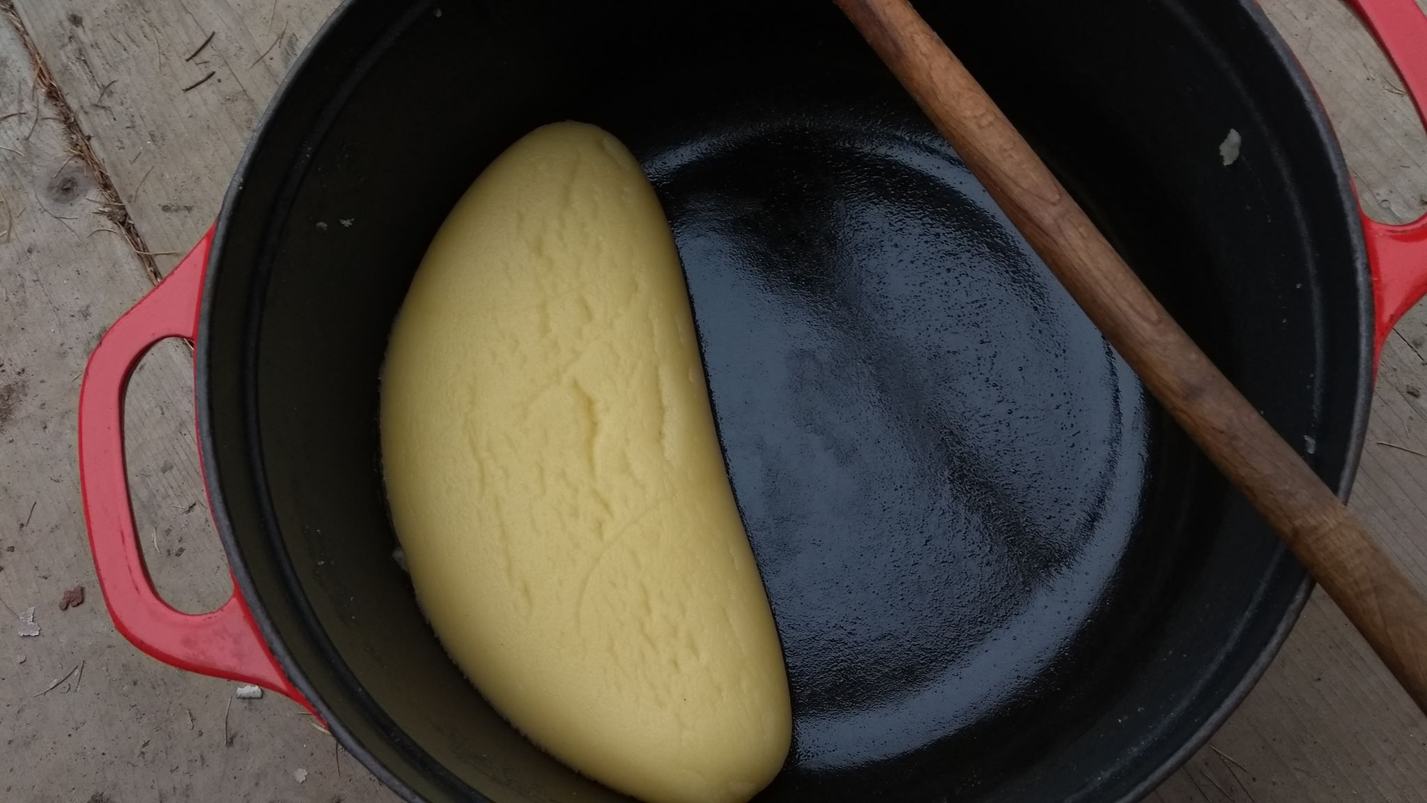 Panade